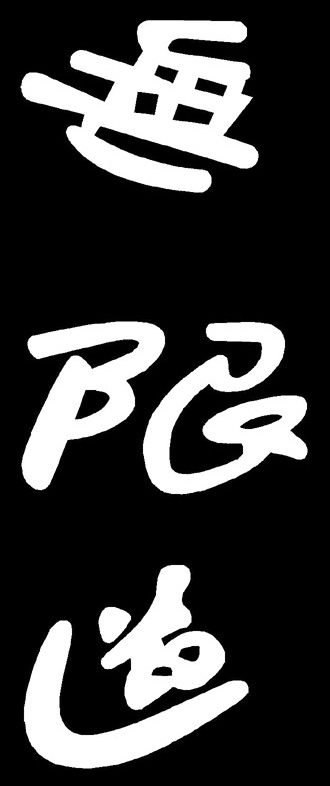 Kanjis que significan Mugendo, Arte marcial moderno